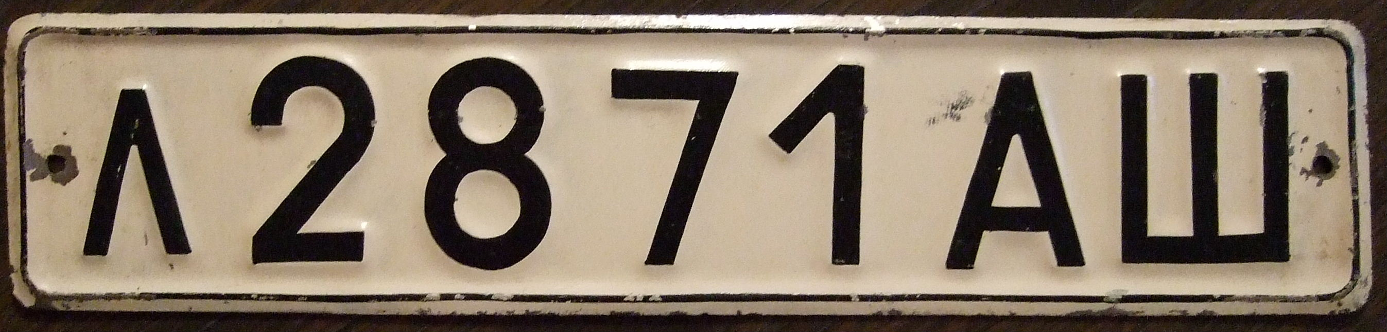 USSR Ashkabad TURKMEN SSR 1980 series